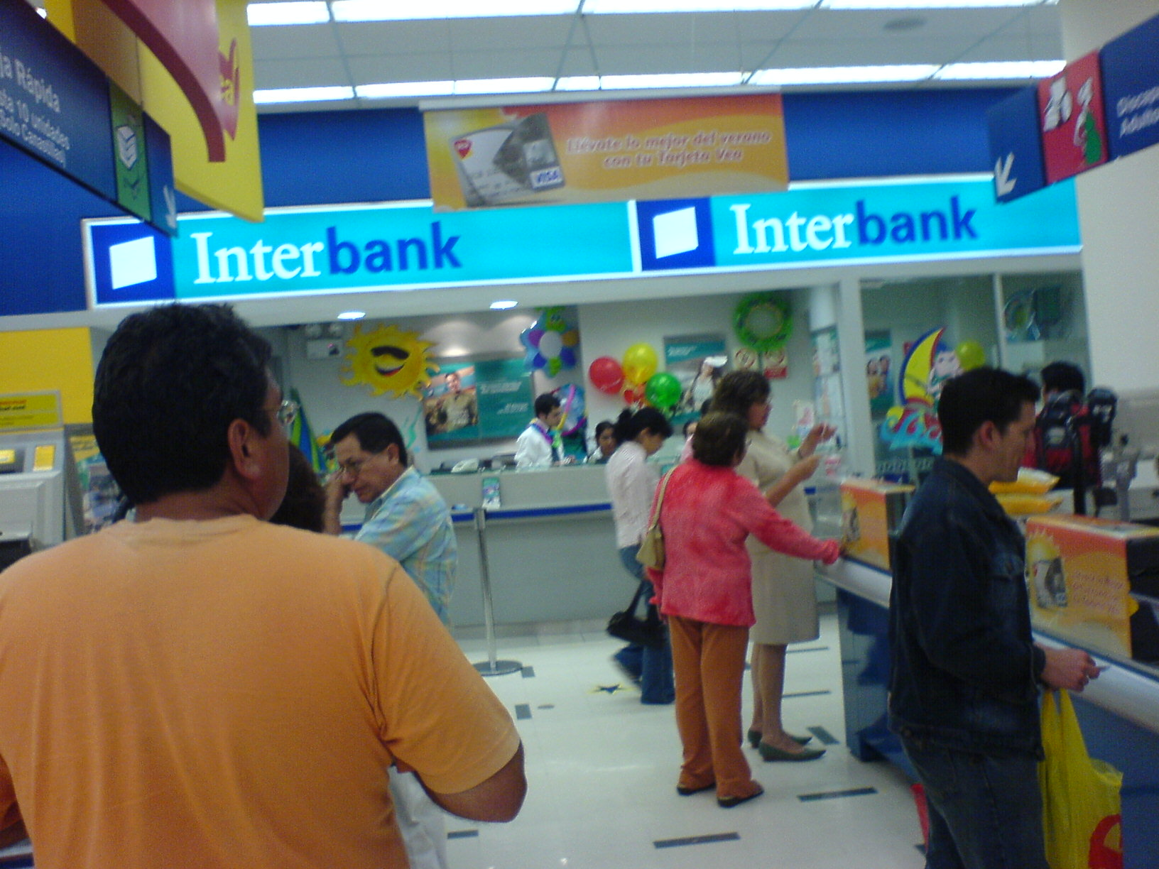 Oficina de Interbank en Plaza Vea San Miguel